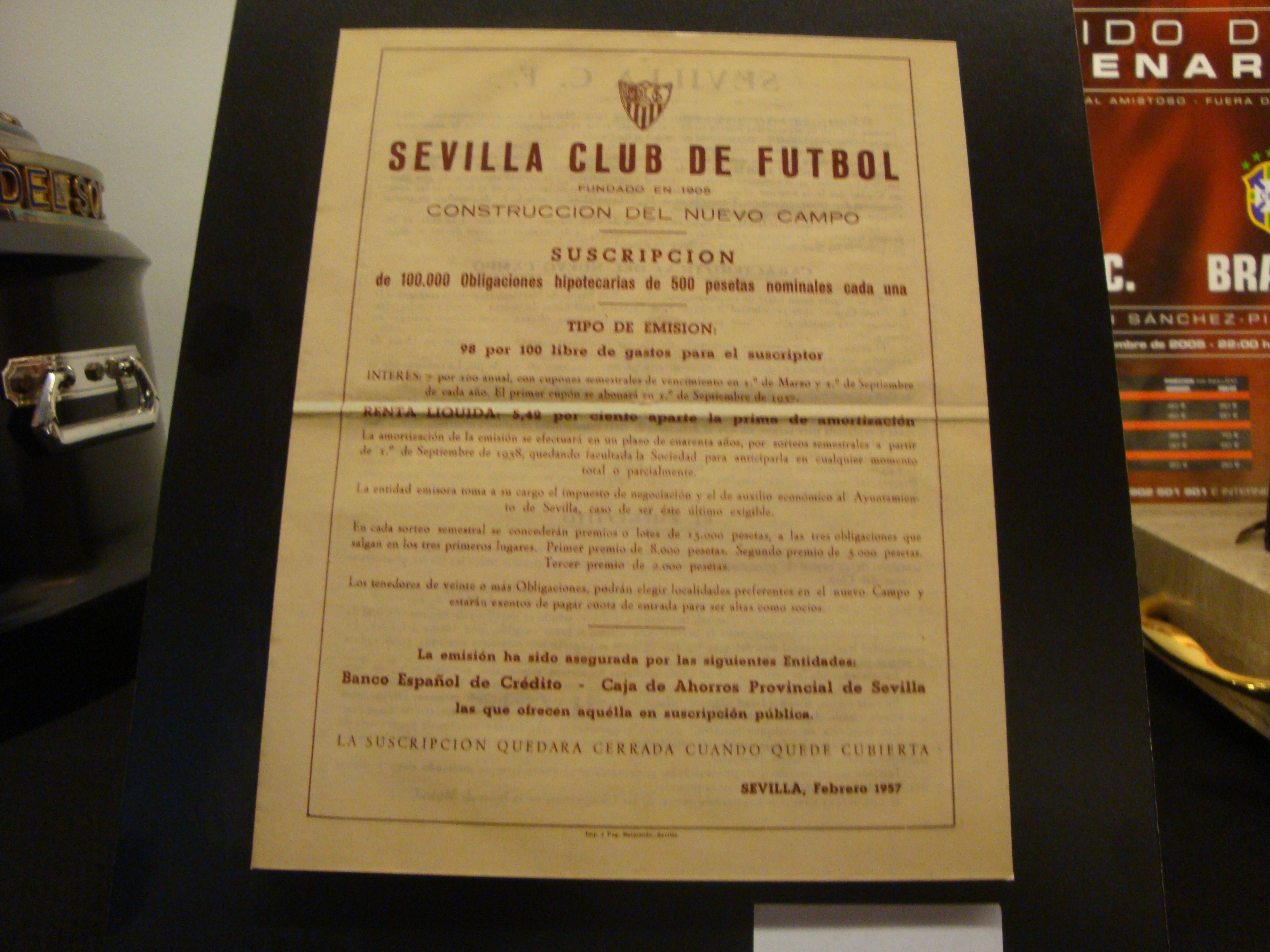 Documento de la suscripción popular para construir el estadio Ramón Sánchez Pizjuán de Sevilla